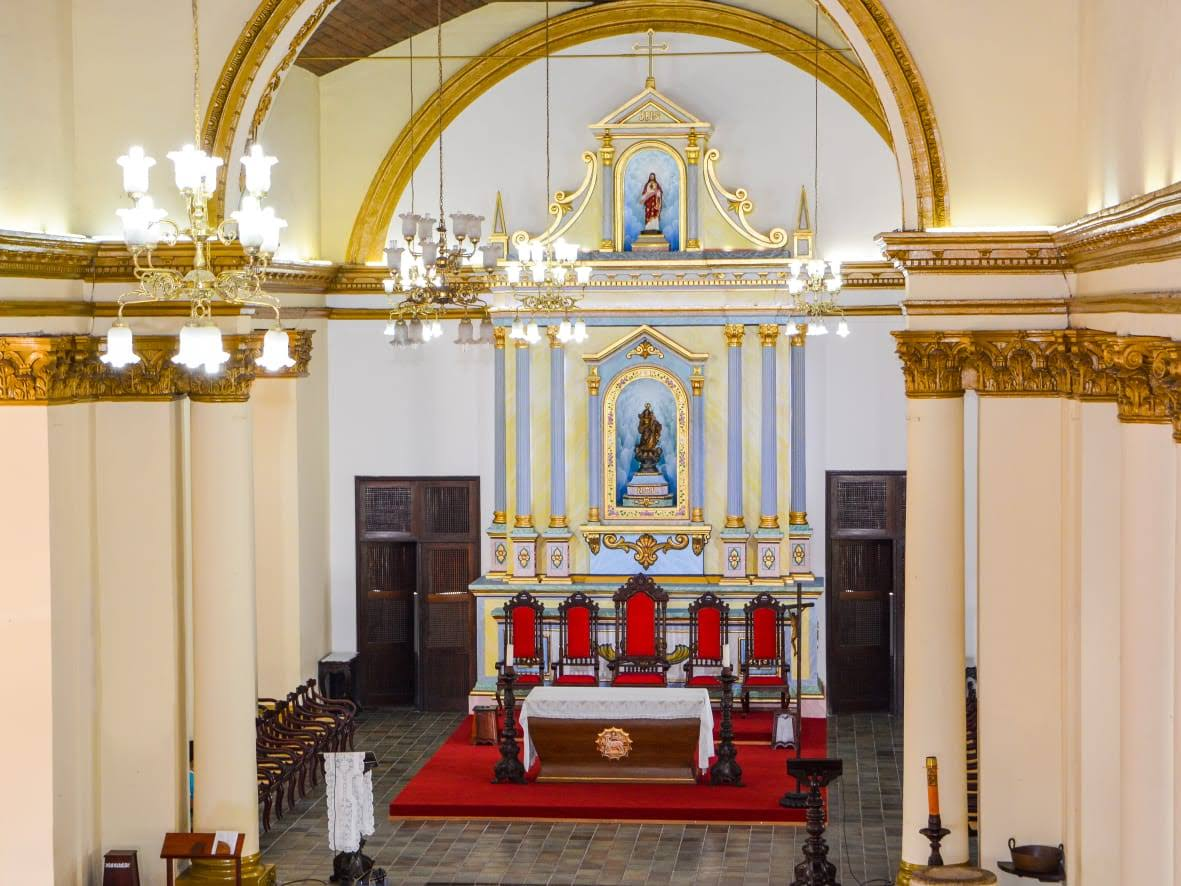 Visão da Nave e do novo e atual Altar-Mor da Paróquia